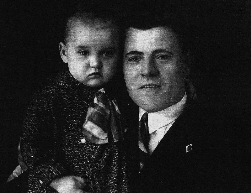 Марком Гаврилович Гурченко с дочерью Люсей, 1936 год